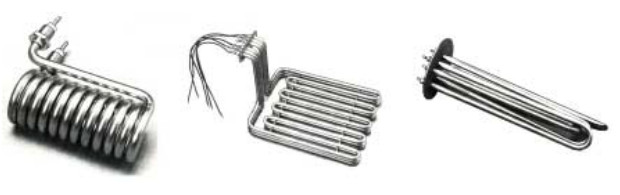 Küttekehade vaated